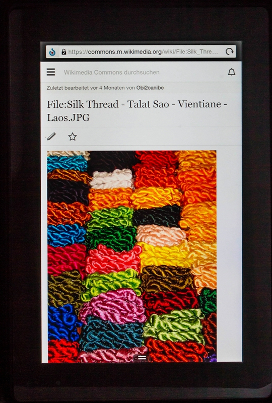 Die Seite File:Silk Thread - Talat Sao - Vientiane - Laos.JPG auf dem Amazon Kindle_Fire (OS 11.3.2.5),_Silk_Browser V1.0 (14,10 MB),_Vollbild_Modus